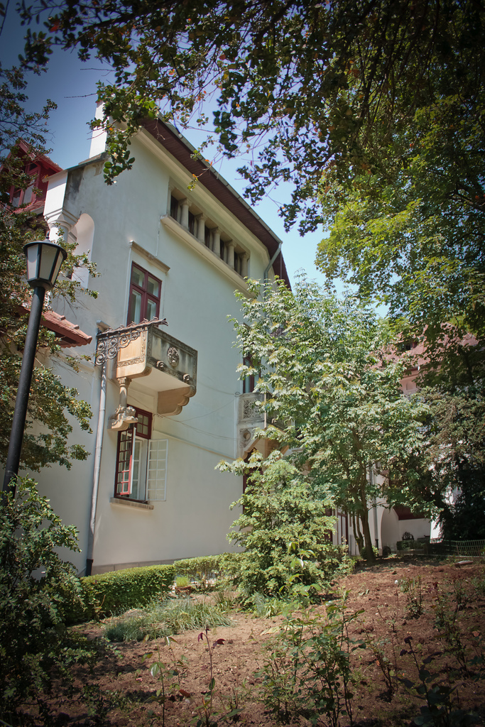 Vila Florica Stefanesti 01